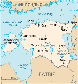 Карта Эстоніі